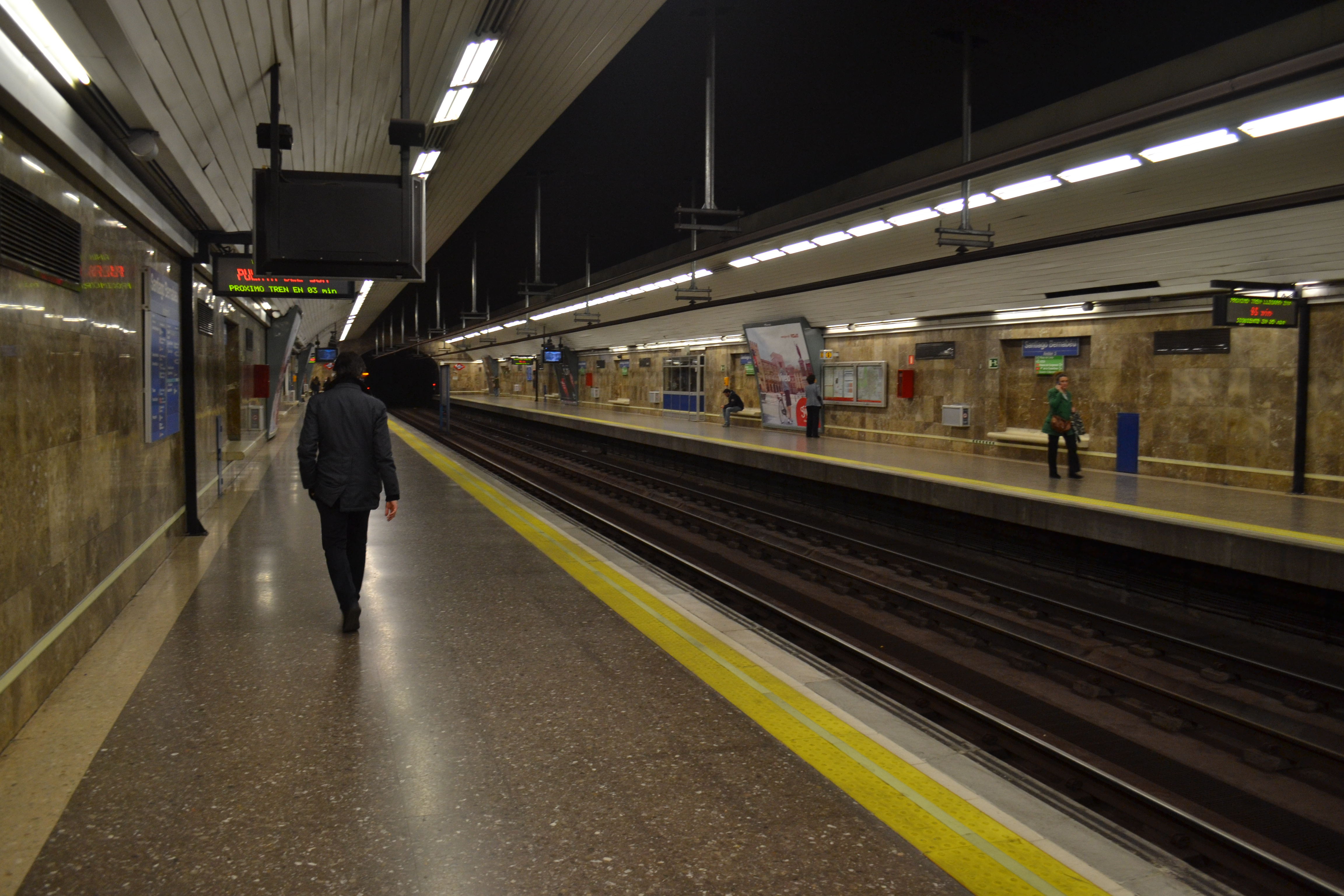 Santiago Bernabéu, Madrid Metro